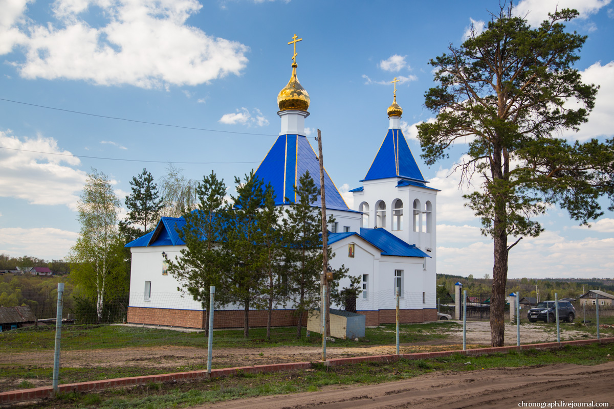 Православный храм Николая Чудотворца (ул. Фрунзе, д. 33А). Построен в 2008-2012 годы.Старая Бинарадка, Самарская область, Россия